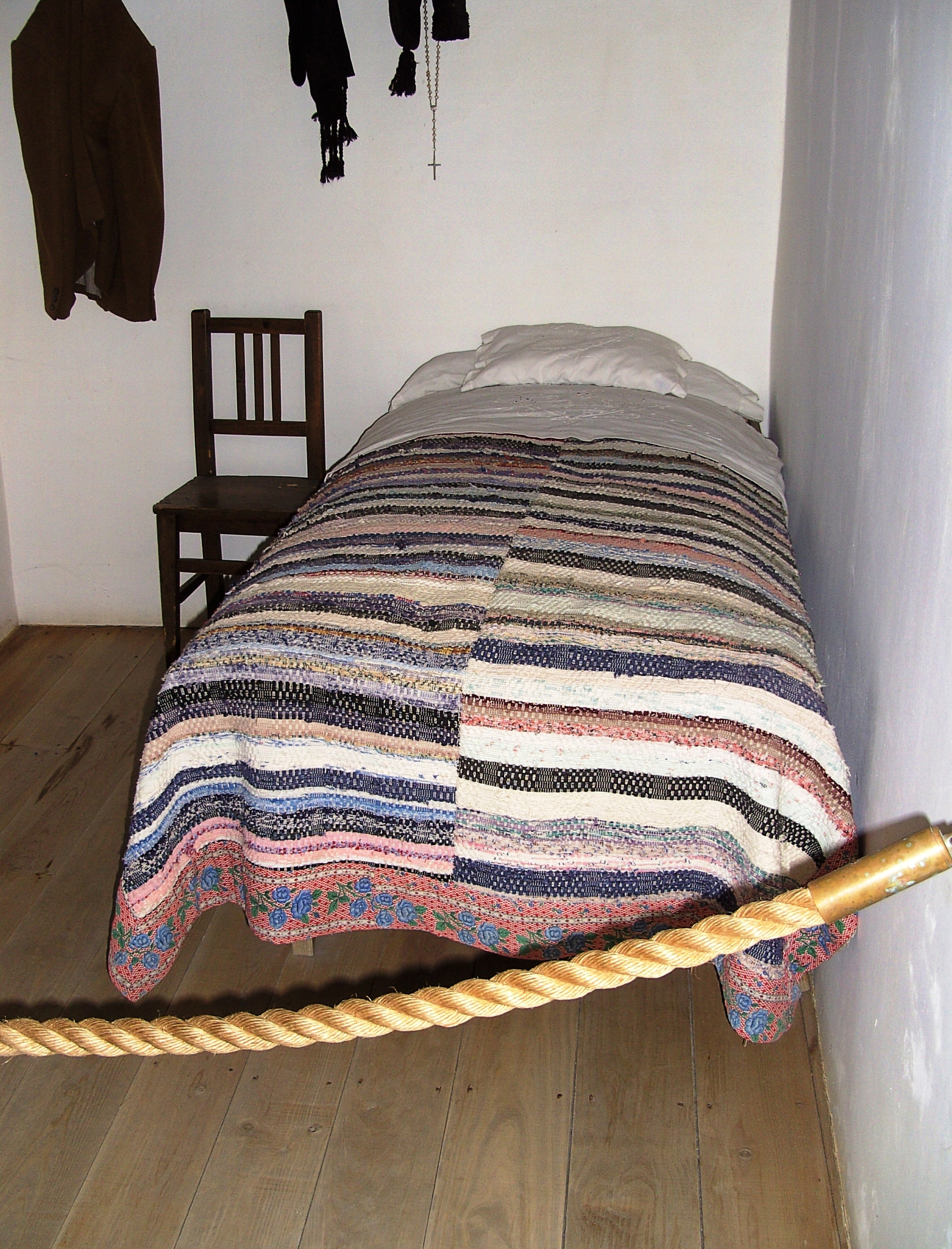 Wohnhaus der Kinder von Fátima.